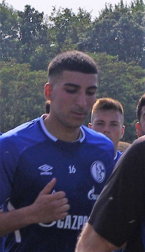 Nassim Boujellab während des Lauftrainings